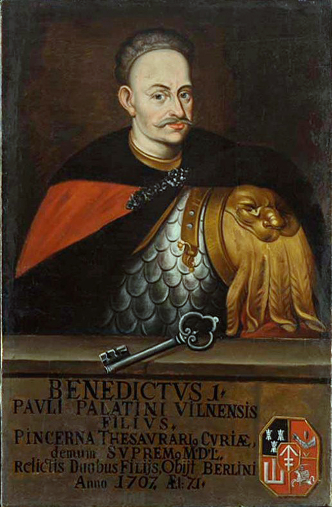 Беларуская (тарашкевіца): Партрэт Бэнэдыкта Паўла Сапегі (Benedykt Pavał Sapieha) гербу «Ліс» (каля 1643 — 1707), дзяржаўнага дзеяча Вялікага Княства Літоўскага, стольніка і крайчага вялікага, падскарбія надворнага і вялікага.